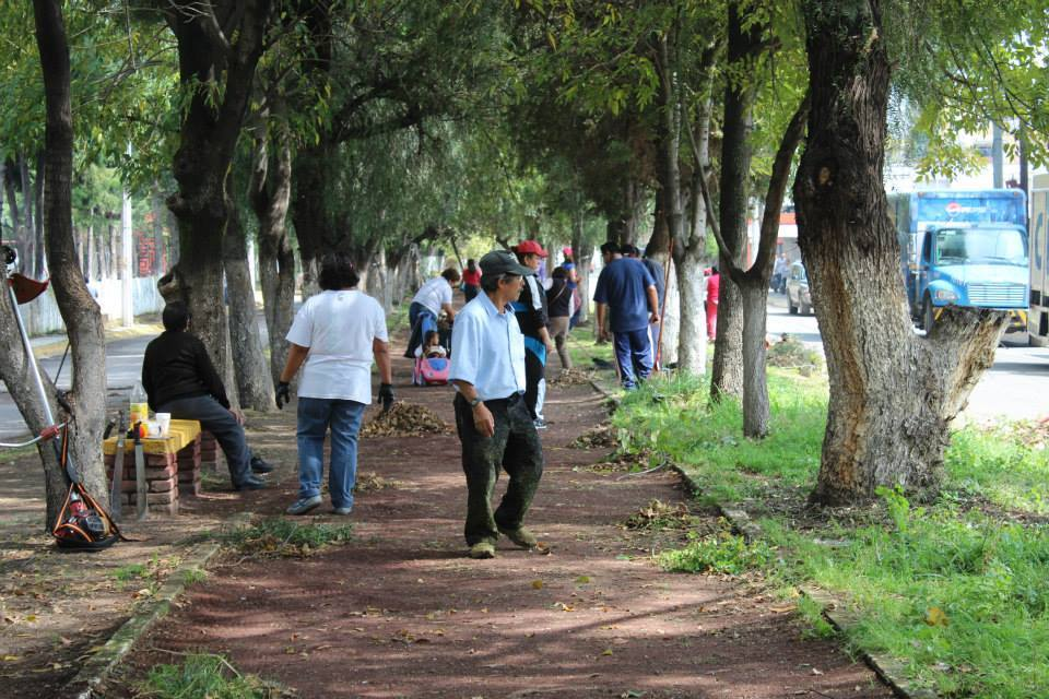 Vecinos Izcalli del Valle